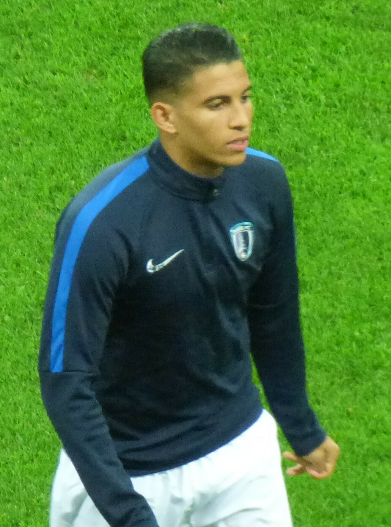 Sabir Bougrine avant le match Lens / Paris, comptant pour la neuvième journée du championnat de France de football de Ligue 2, le 28 septembre 2018.